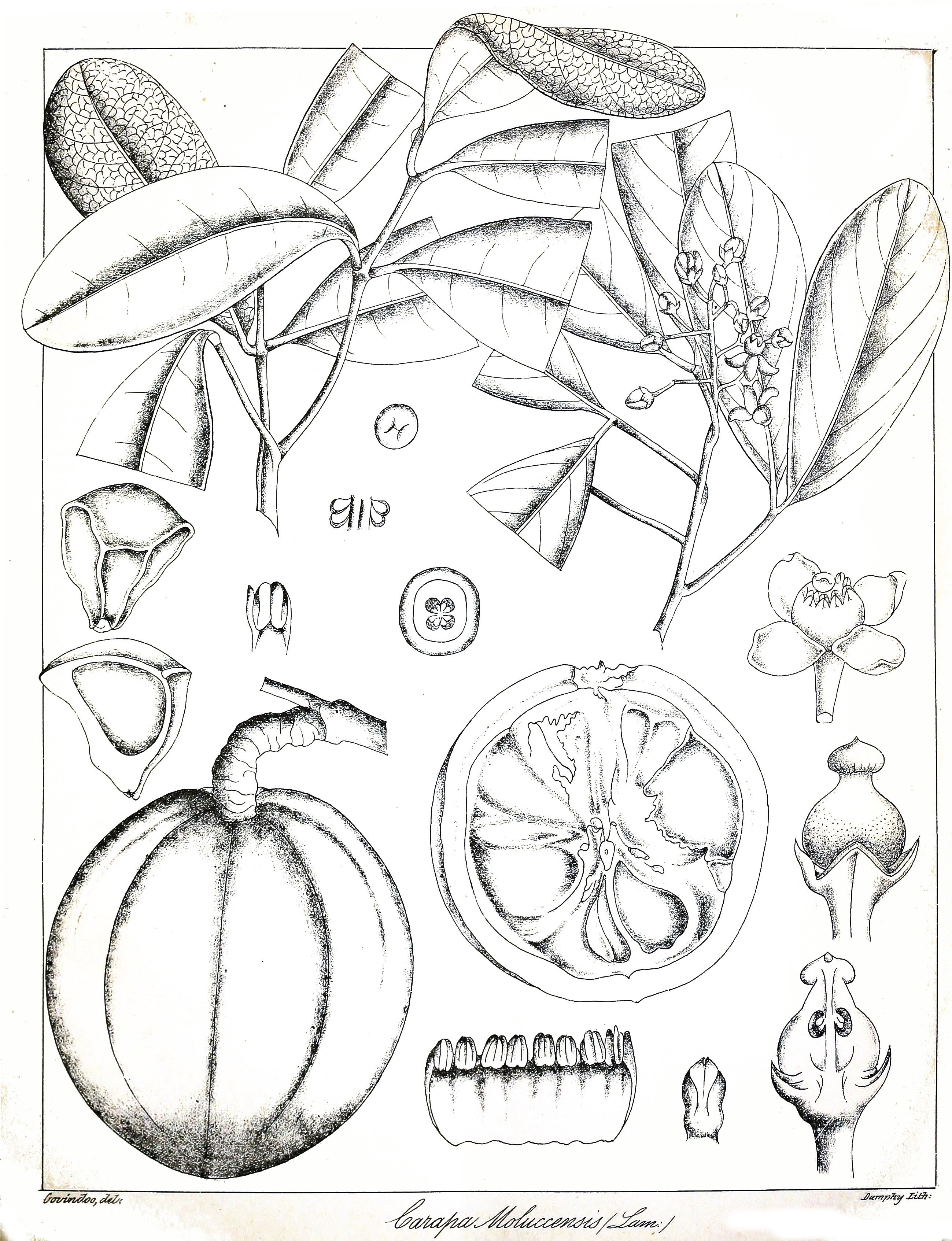 Xylocarpus moluccensis